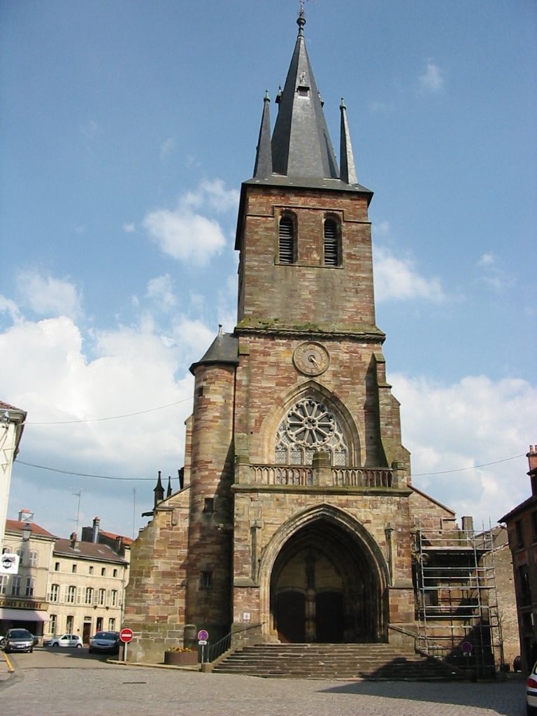 Église Sainte-Libaire Commune de Rambervillers Département des Vosges Photographie personnelle, prise le 4 mai 2006 Copyright © Christian Amet